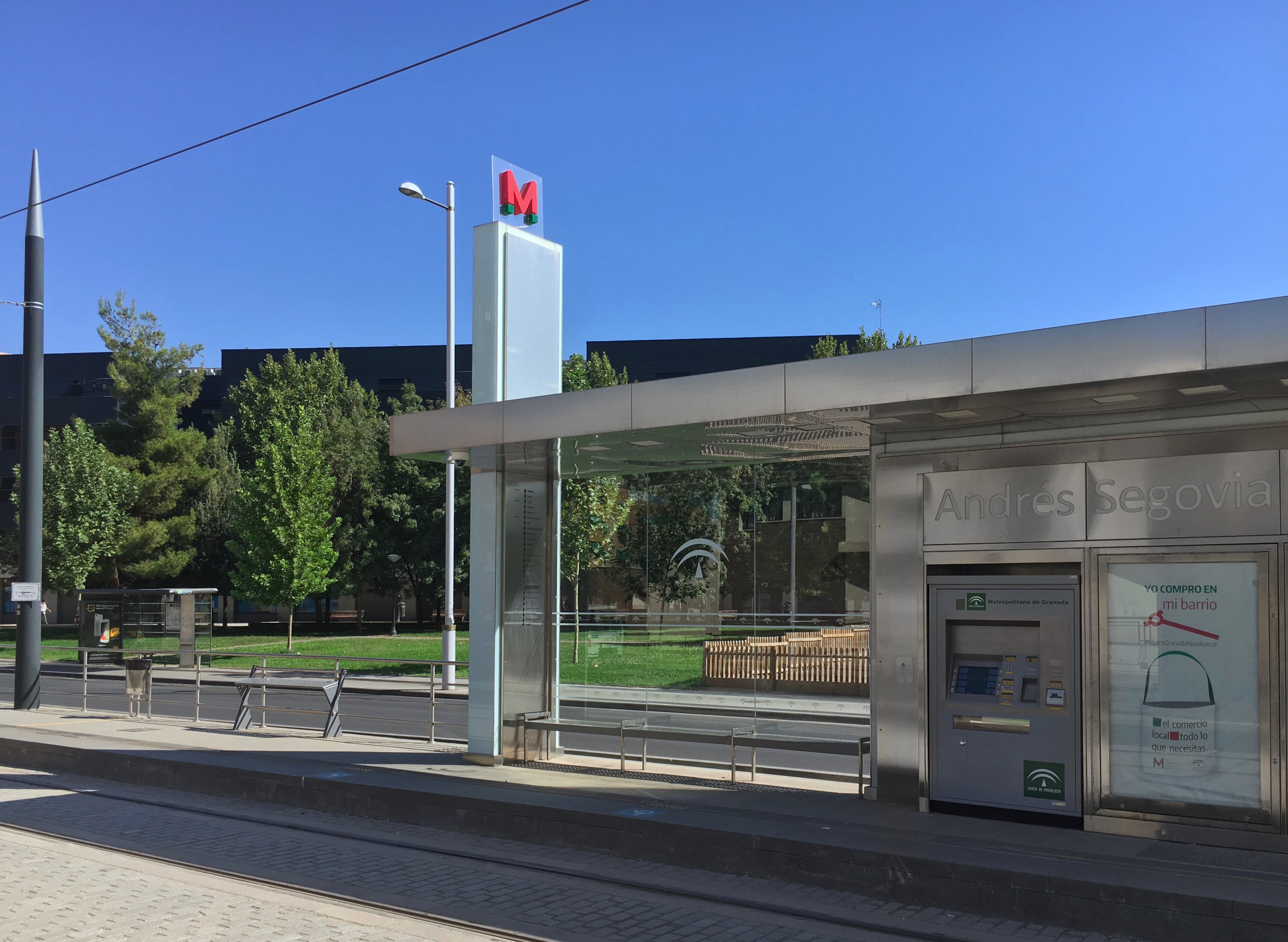 Estación de Andrés Segovia del Metro de Granada.